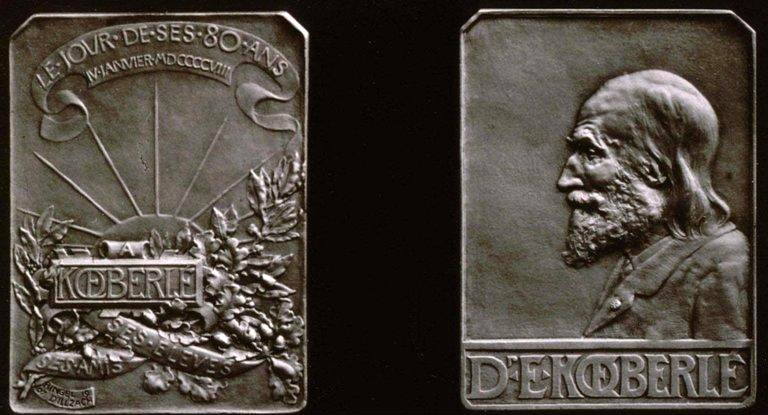 Plaquette Kœberlé par Ringel d'Illzach. Revue alsacienne illustrée, 1910. Bibliothèque nationale et universitaire de Strasbourg